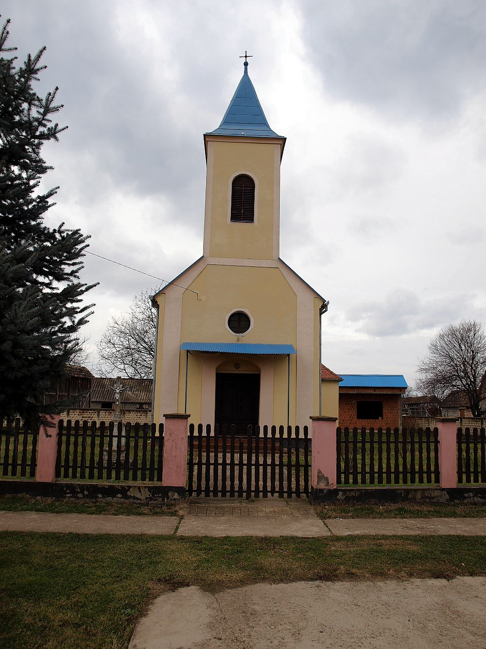 Grkokatolička crkva u Šumeću, Brodsko-posavska županija.